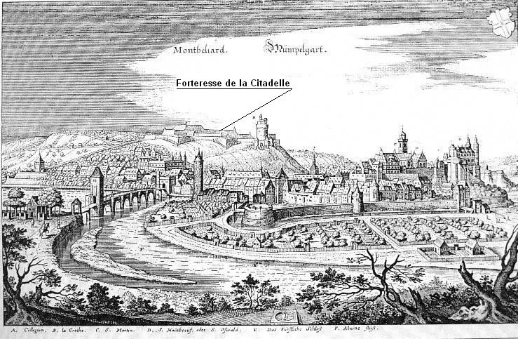 Gravure du 17ième siècle dela forteresse de la Citadelle et des fortifications de Montbéliard.